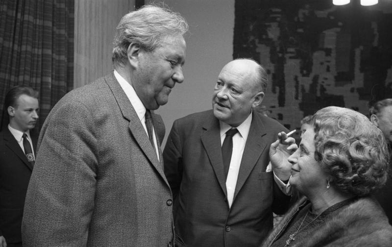 Empfang der LaVertr. Niedersachsen anl. Geburtstag von Frau Min. Maria Meyer-Sevenich (v.l.n.r.: Bundesminister Prof. Dr. Carlo Schmid, MdB Prof. Dr. v. Merkatz, Frau Hertha Pech, BdV-Bundesvorstand)